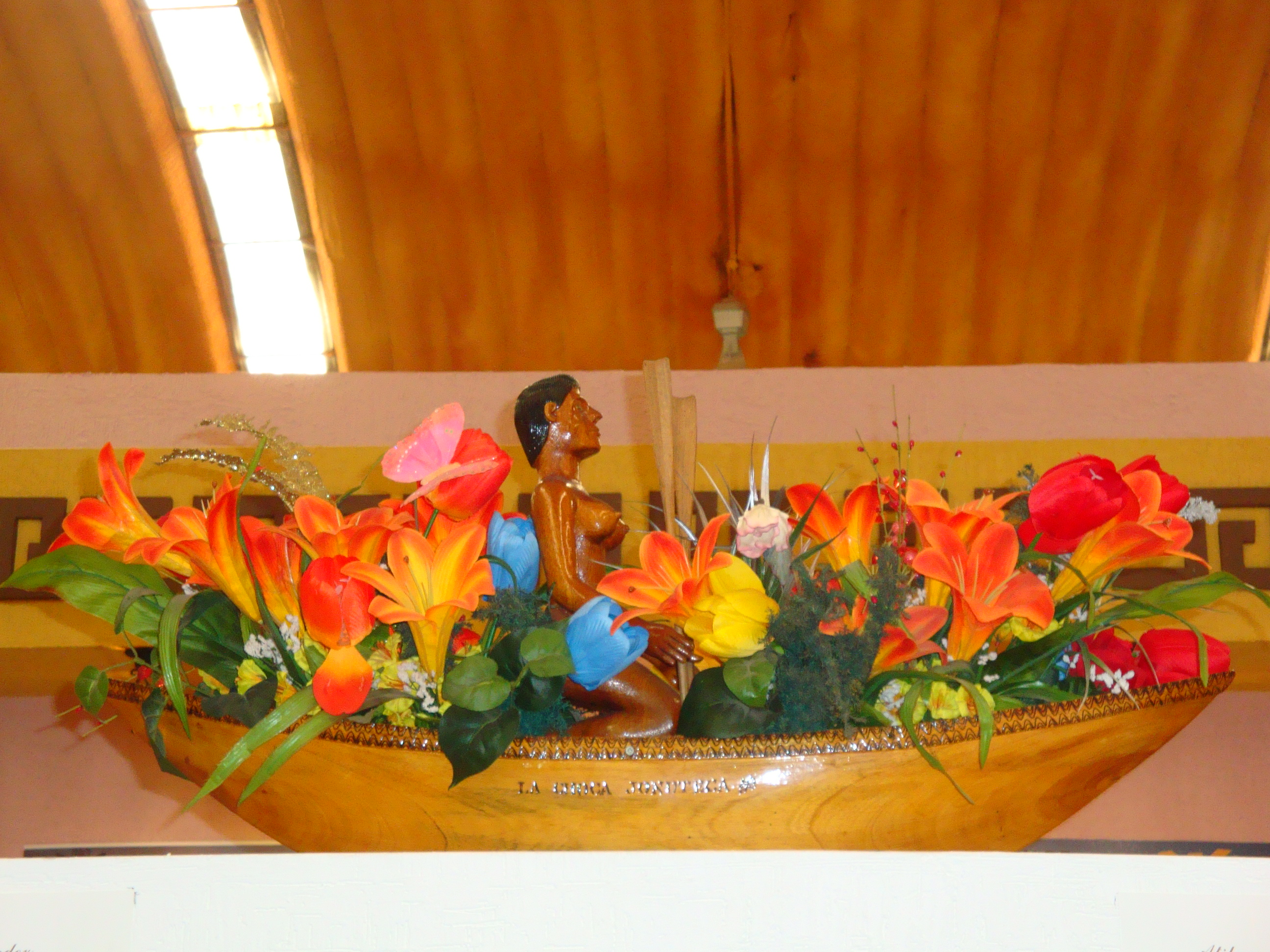 Cayuco de madera con flores. Artesanía del municipio de Jonuta, Tabasco, México.